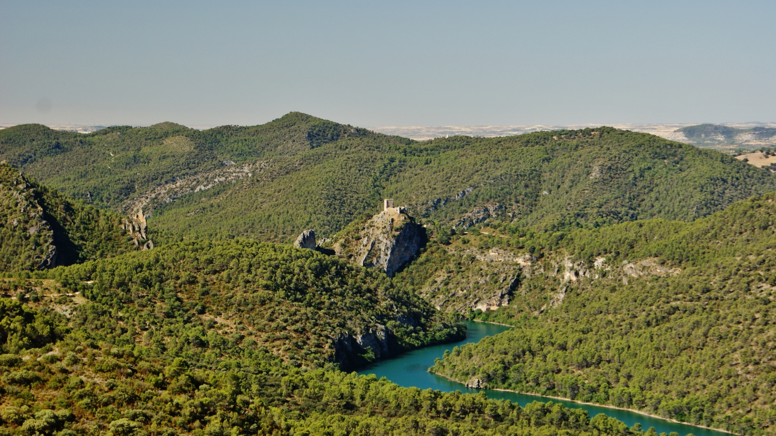 Castillo de Aguix, castillo medieval erigido en 1160 por Martín Ordoño. Se encuentra sobre una peña asomado al río Tajo en Aguix, Sayatón, Guadalajara